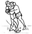 crochetage1.jpg